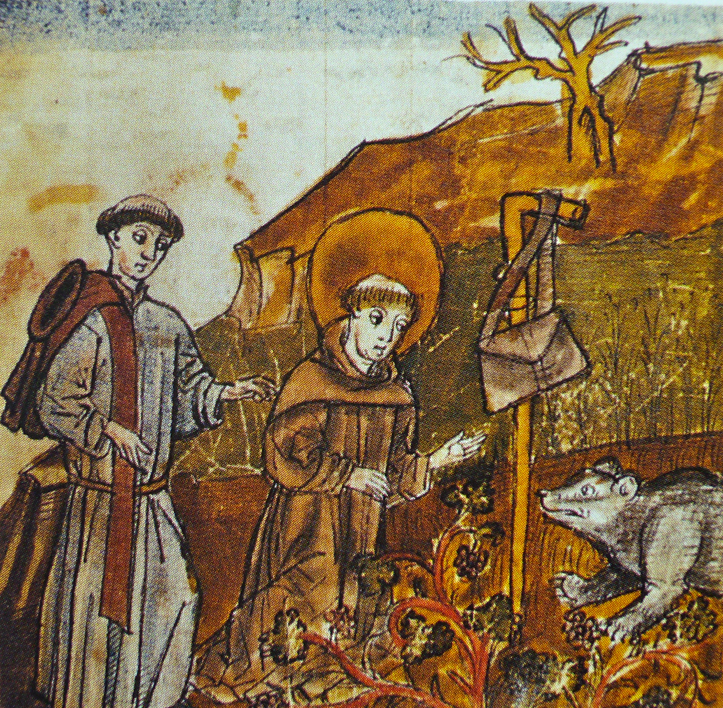 S., Gallus an der Steinach. St. Galler Handschrift, um 1450